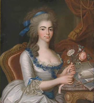 Augusta Wilhelmine of Hesse-Darmstadt (1765-1796)